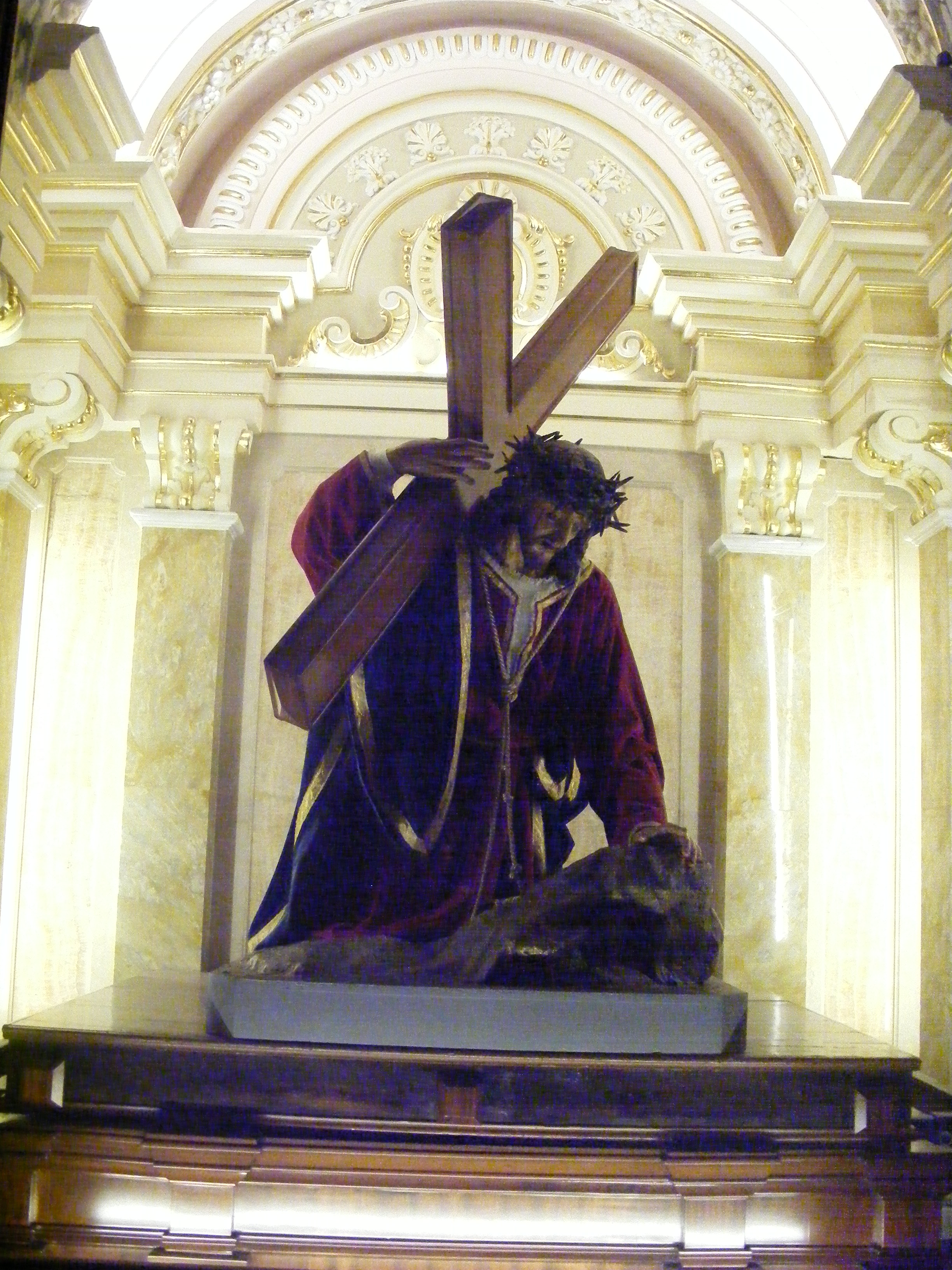 Figura "Upadek Jezusa pod ciężarem Krzyża" wykonana z papier mâché w 1700. Jest jedną z siedmiu figur noszonych podczas wielkopiątkowej procesji po ulicach Rabatu na Gozo.